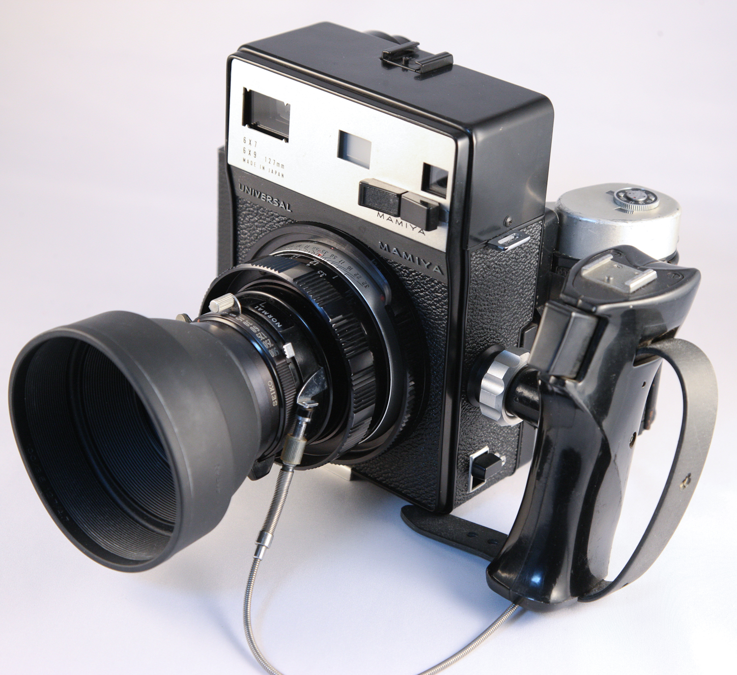 Mamiya Universal camera, 100mm f3.5 6x9 Polaroid PANDA